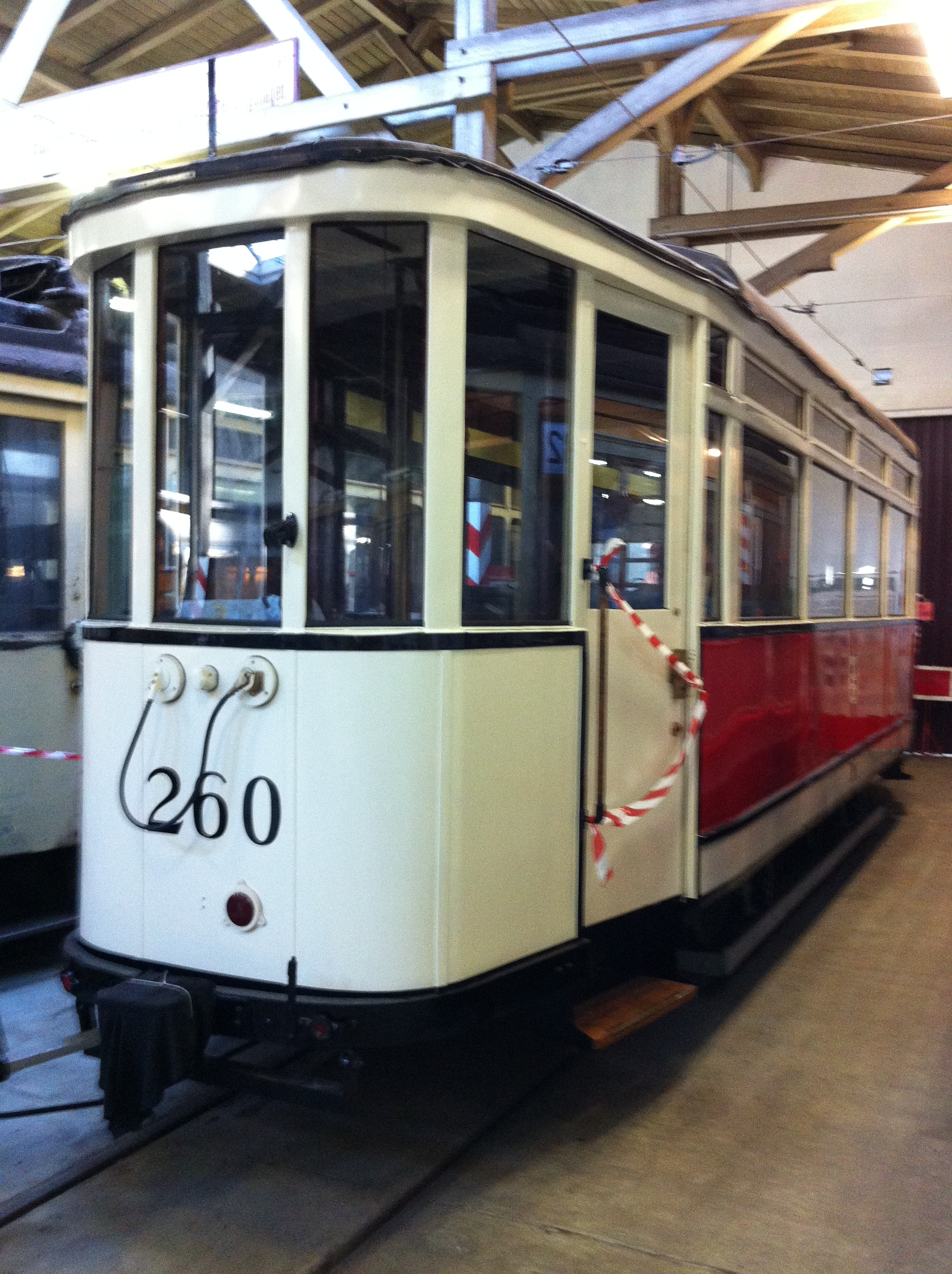 Strassenbahnbeiwagen Nr 260 des Straßenbahnmuseums in Halle (Saale)